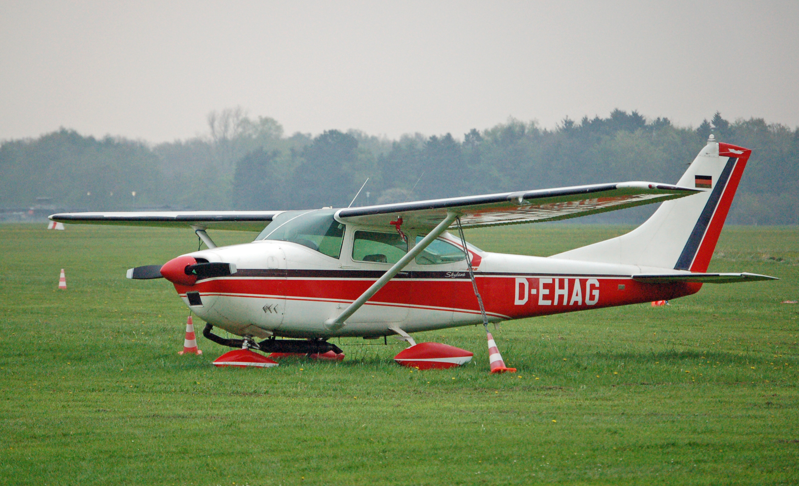 Cessna 182G Skylane (D-EHAG) auf dem Flugplatz Uetersen